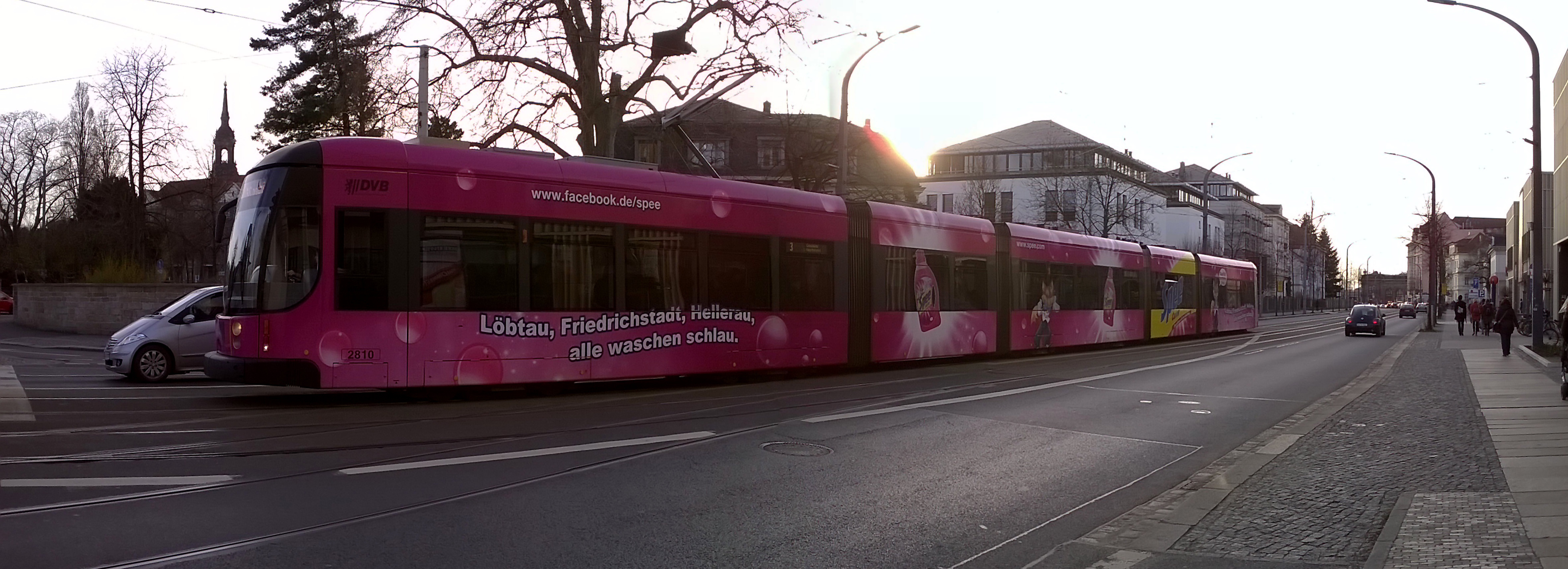 Spee-Werbung auf der Straßenbahn 2810 der Dresdner Verkehrsbetriebe (Linie 3 nach Coschütz) in der Antonstraße am Albertplatz